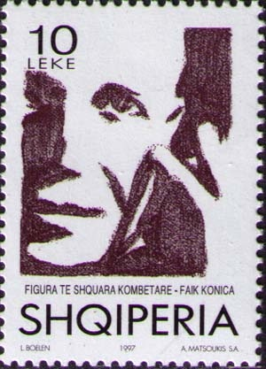 Faik Konica